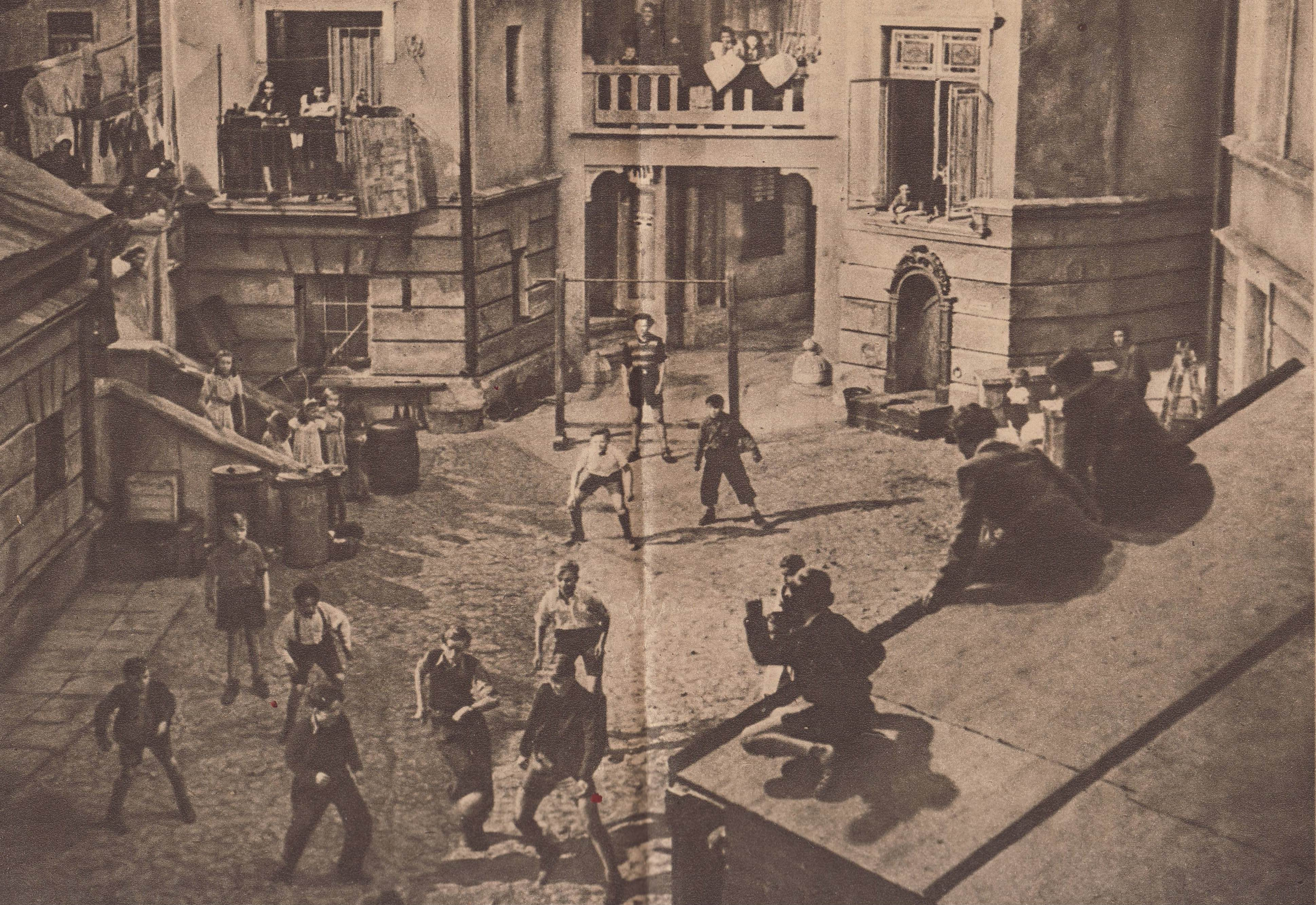 Kręcenie filmu Ulica Graniczna: Podwórze kamienicy odtworzone w atelier na Barrandowie